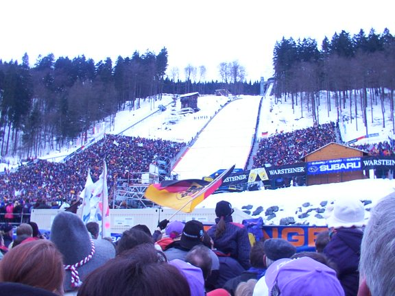 Skisprung Weltcup in Willingen